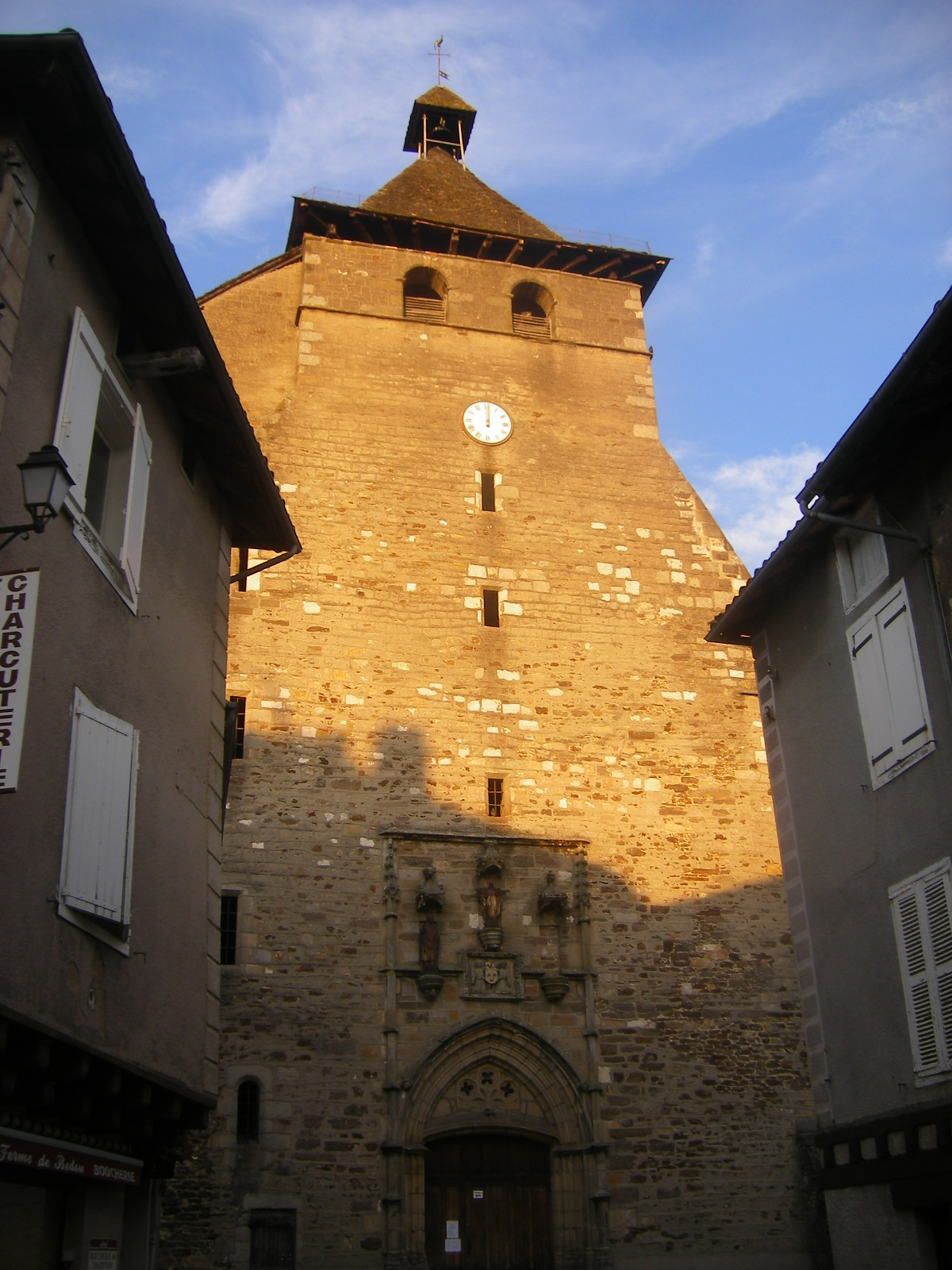 Maurs